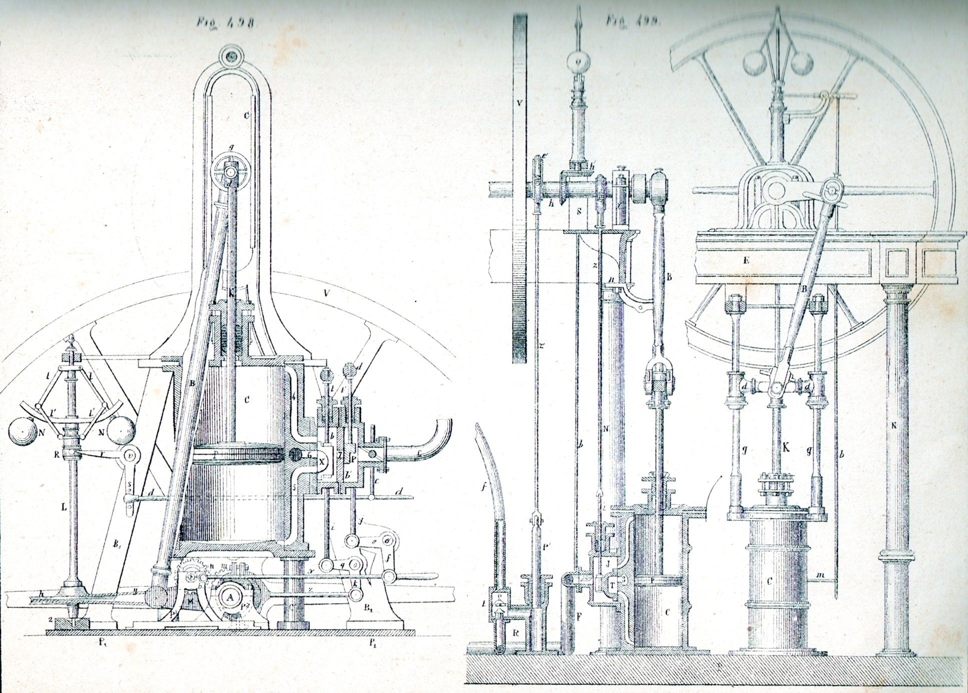 Steam machines